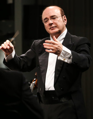 کنسرت ارکستر مجلسی ایران به رهبری منوچهرصهبایی در پنجمین روز از سی و چهارمین جشنواره موسیقی فجر در تالار وحدت